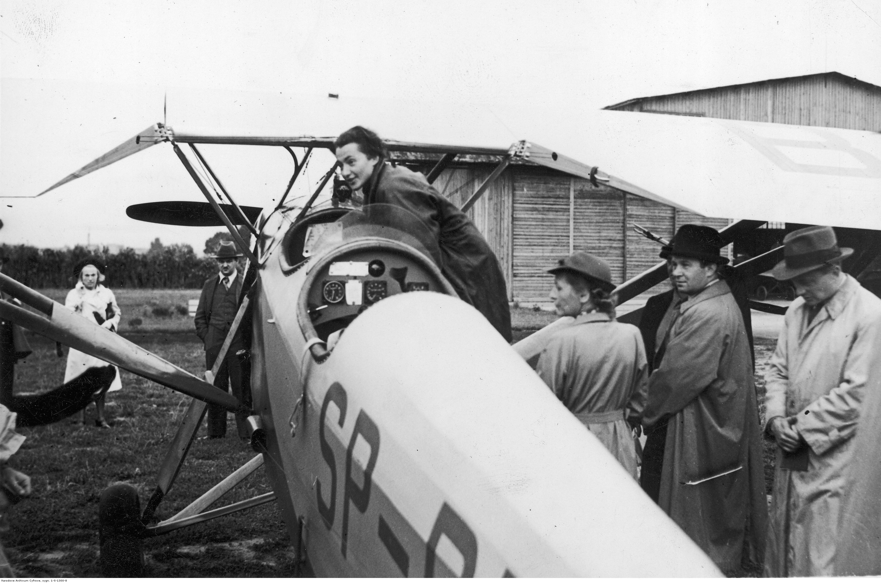 Krajowe zawody lotnicze na Lotnisku Mokotowskim w Warszawie; sierpień 1938. Pilot Stefania Wojtulanis (wysiada z samolotu RWD-8) po przylocie na zawody. Widoczni także m.in.: obok samolotu (1. z lewej) p. Osińska i redaktor Marth. Koncern Ilustrowany Kurier Codzienny - Archiwum Ilustracji. Sygnatura: 1-S-1300-8